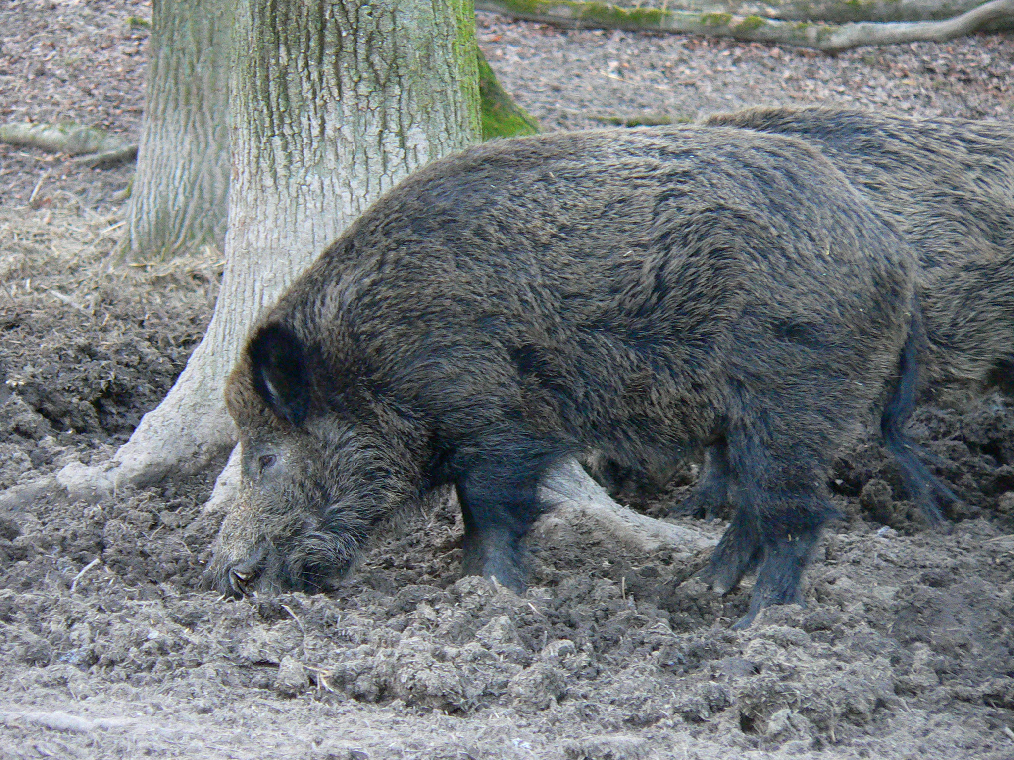 Im Tierpark Sababurg im Reinhardswald (Hessen), Schwarzwild (Keiler)